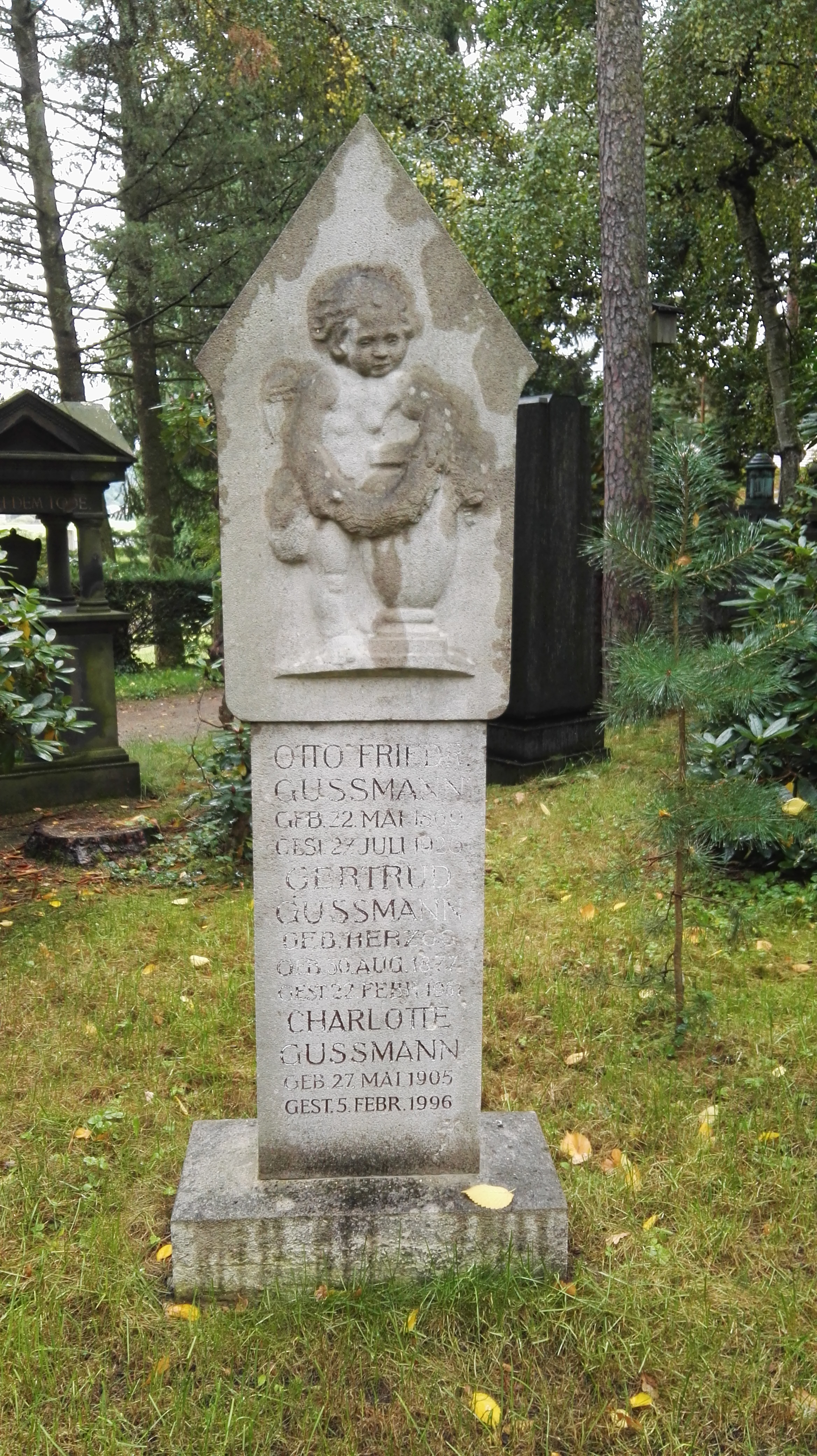 Grab von Otto Gussmann auf dem Urnenhein Tolkewitz